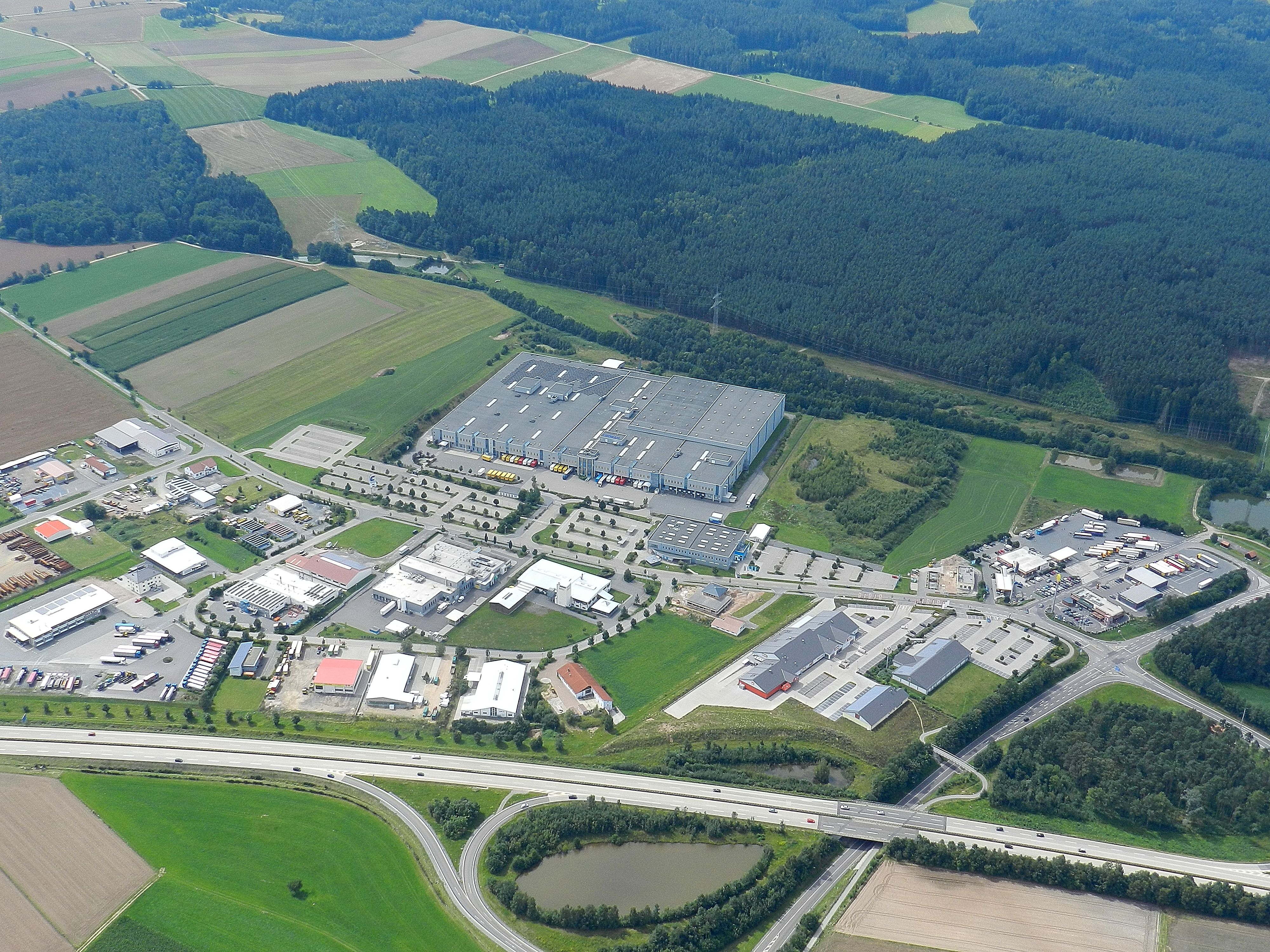 Wernberg-Köblitz, Industriegebiet an der A93 mit "Conrad Electronic", Versand- und Logistikzentrum. (2011)